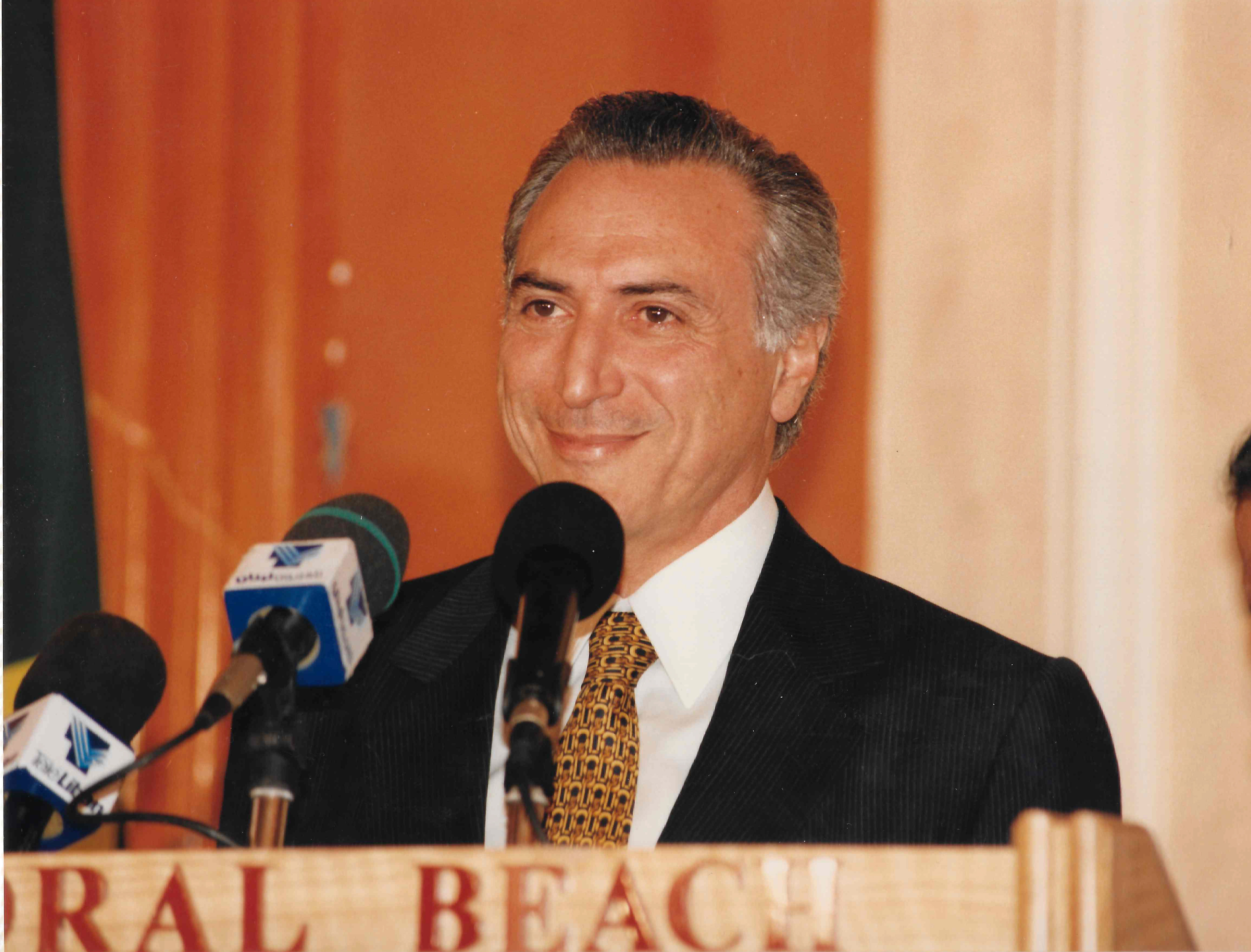 Foto de época de Michel Temer disponibilizado por sua assessoria. Data precisa não informada.